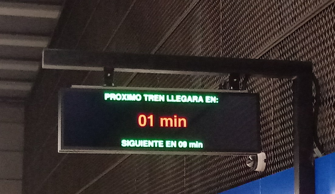 Nuevo teleindicador en la estación de Arroyo del Fresno (Metro de Madrid)